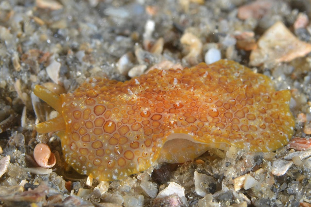 Pleurobranchus areolatus (sinonimia: Pleurobranchus crossei), Florida , Estados Unidos